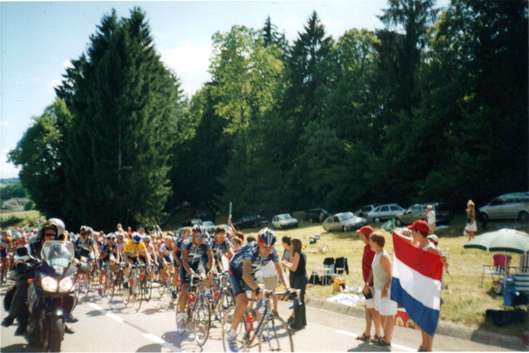 Le peloton lors de l'étape 18 du Tour de France 2002 en sortie de Nurieux-Volognat (Ain), dans la montée du col du Berthiand